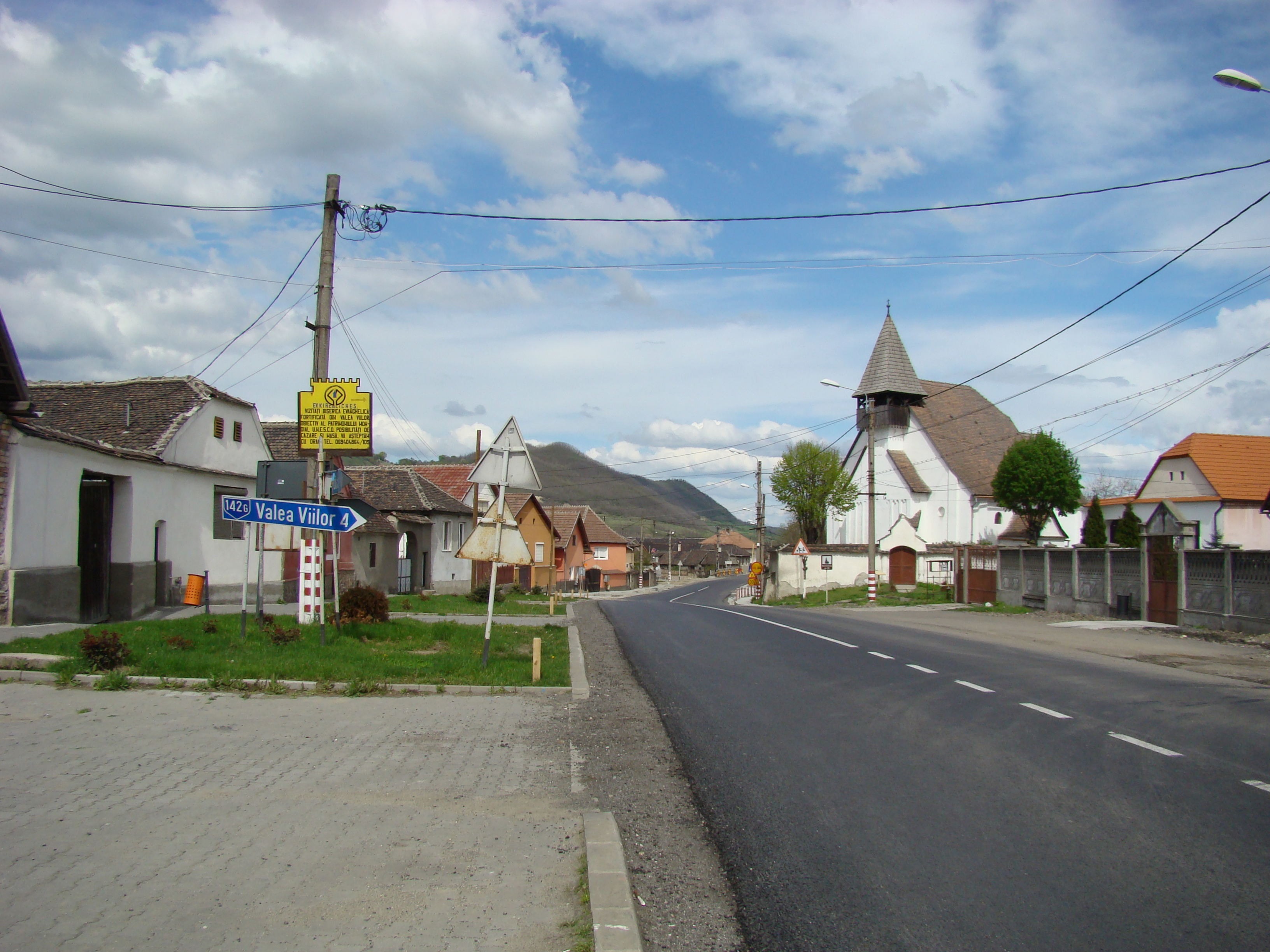 Ansamblul bisericii evanghelice, oraș Copșa Mică, str. Mediașului 100